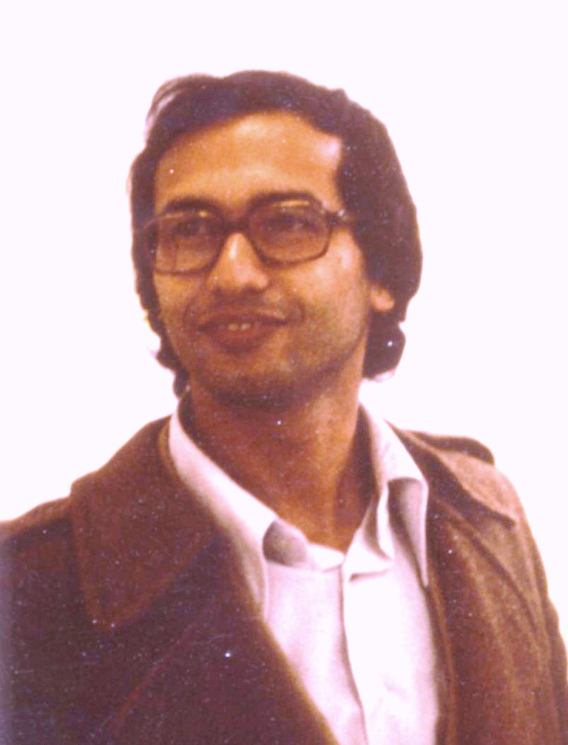 L'écrivain algérien Tahar Djaout